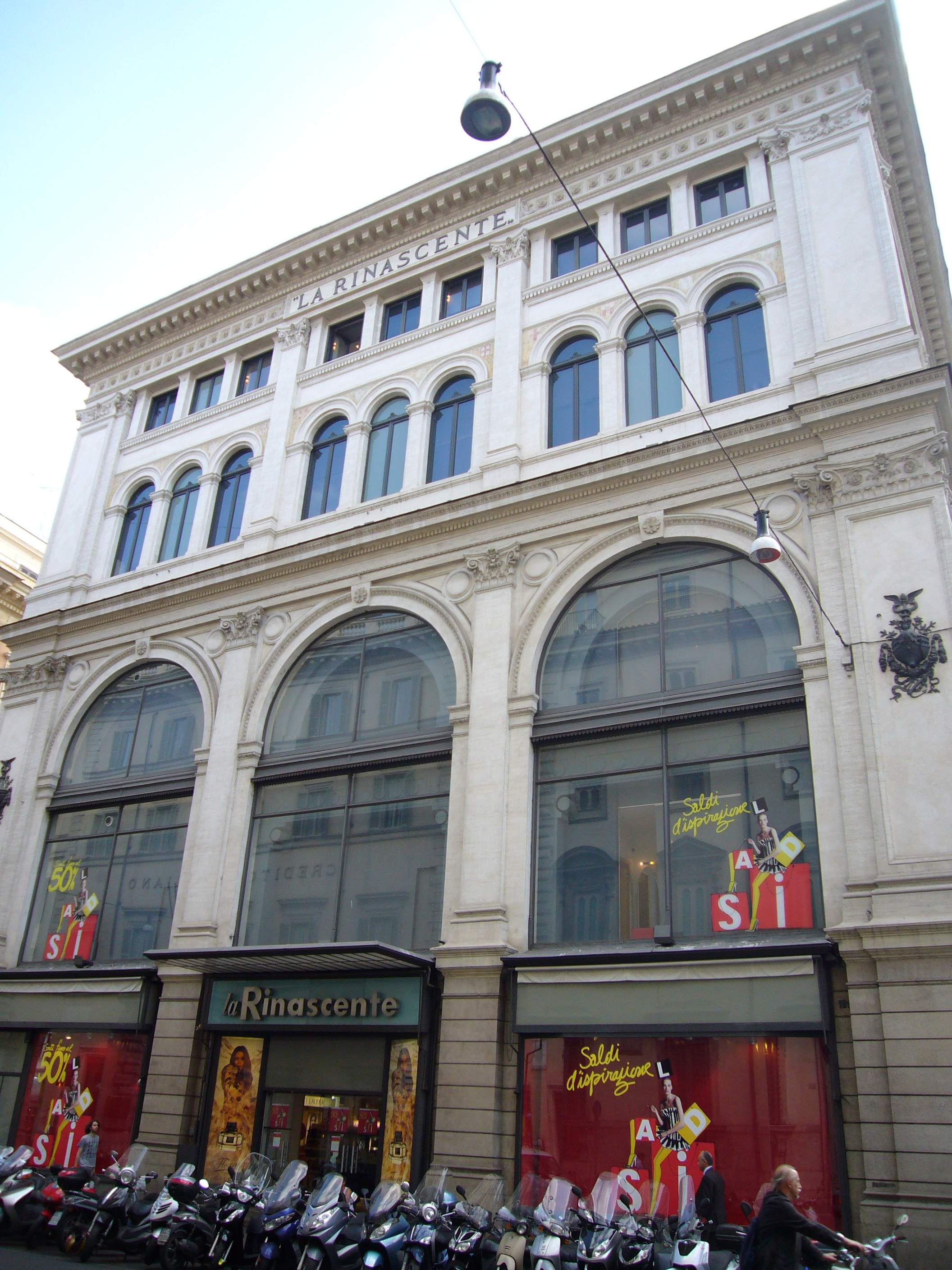 Roma, palazzo della Rinascente lato largo Chigi (Pio Piacentini, 1920)